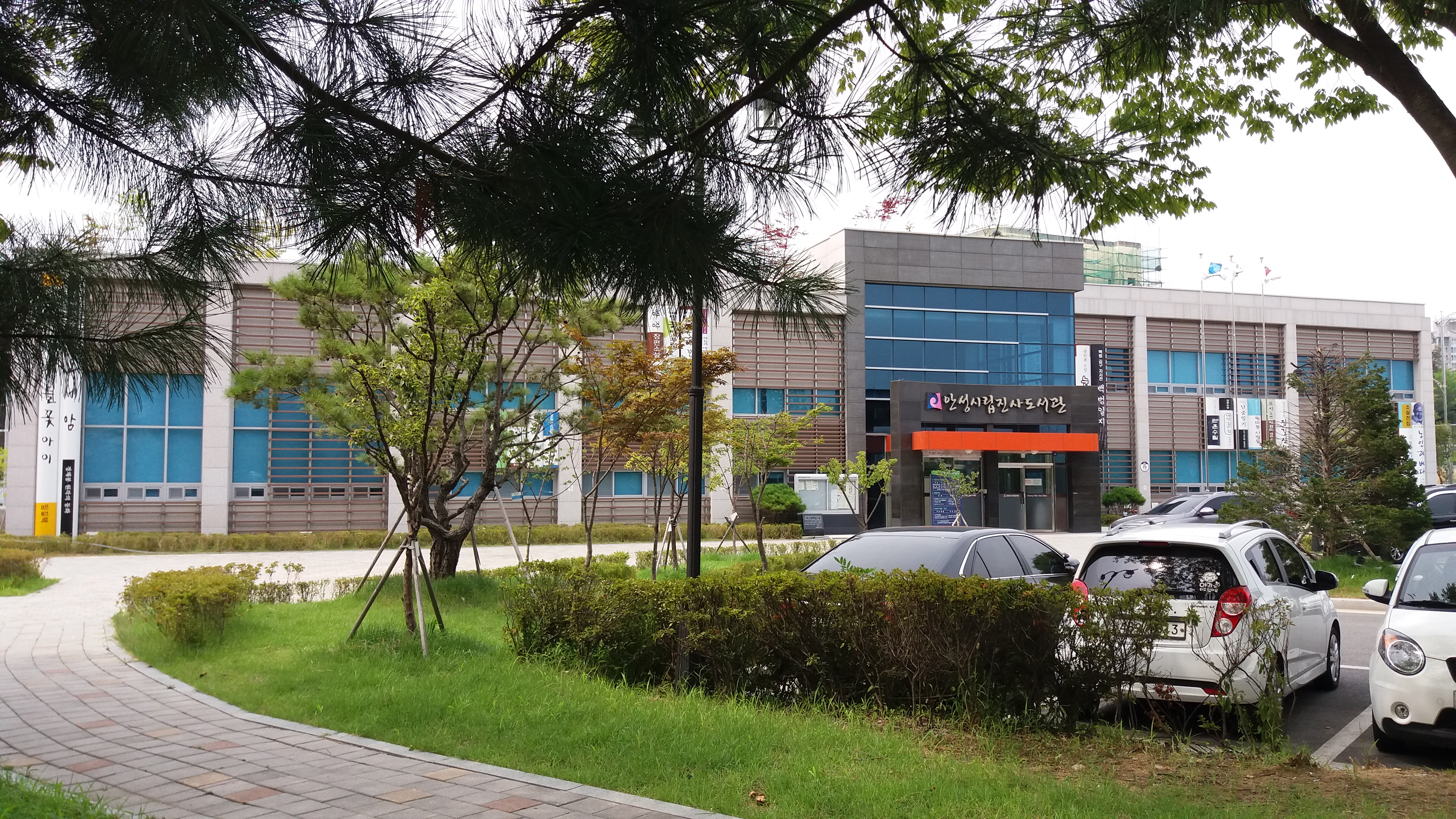 안성시립진사도서관